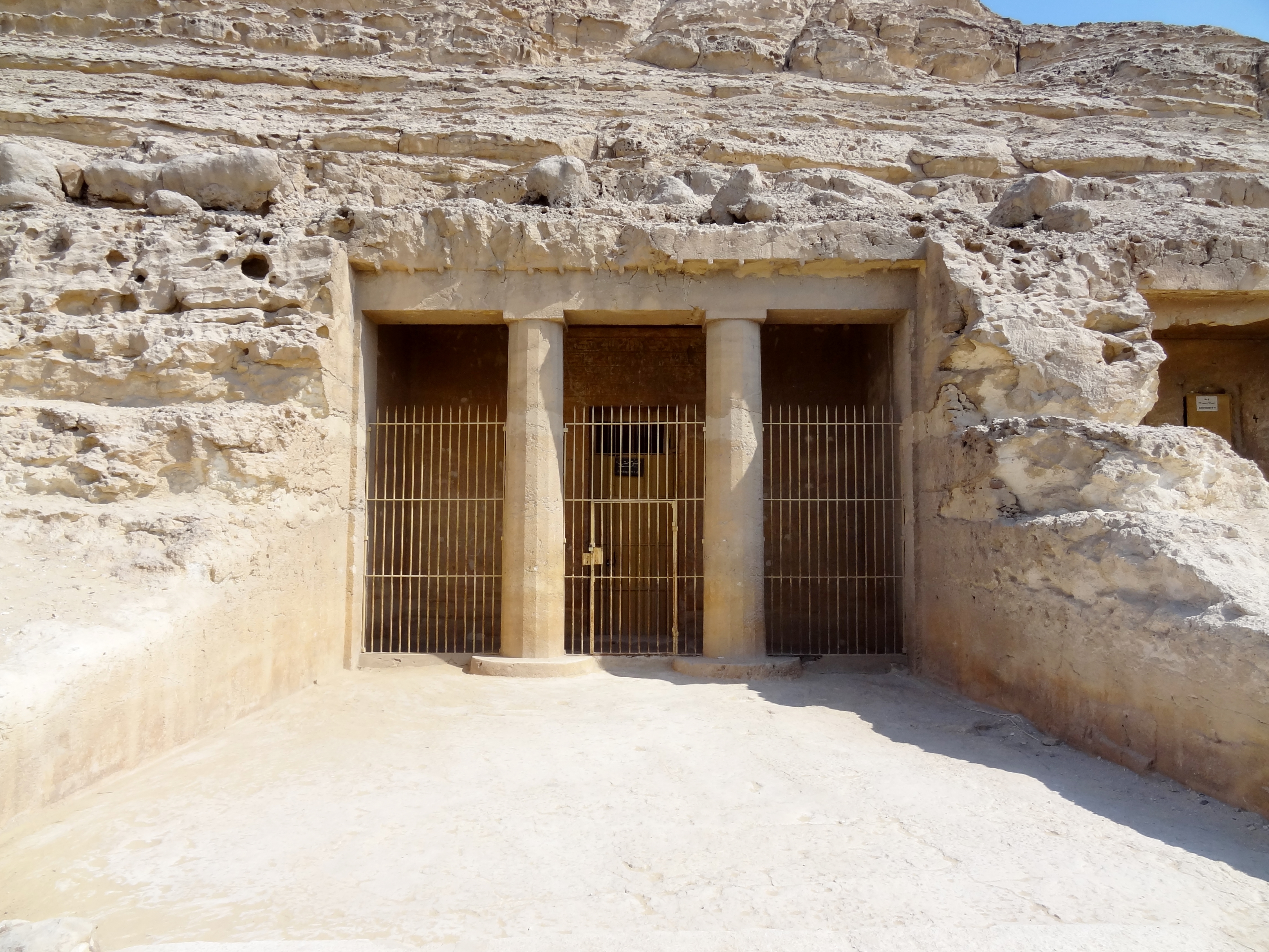 Eingang zum Grab des Chnumhotep II. (BH 3) der Felsengräber von Beni Hassan, südlich von El Minya, Ägypten